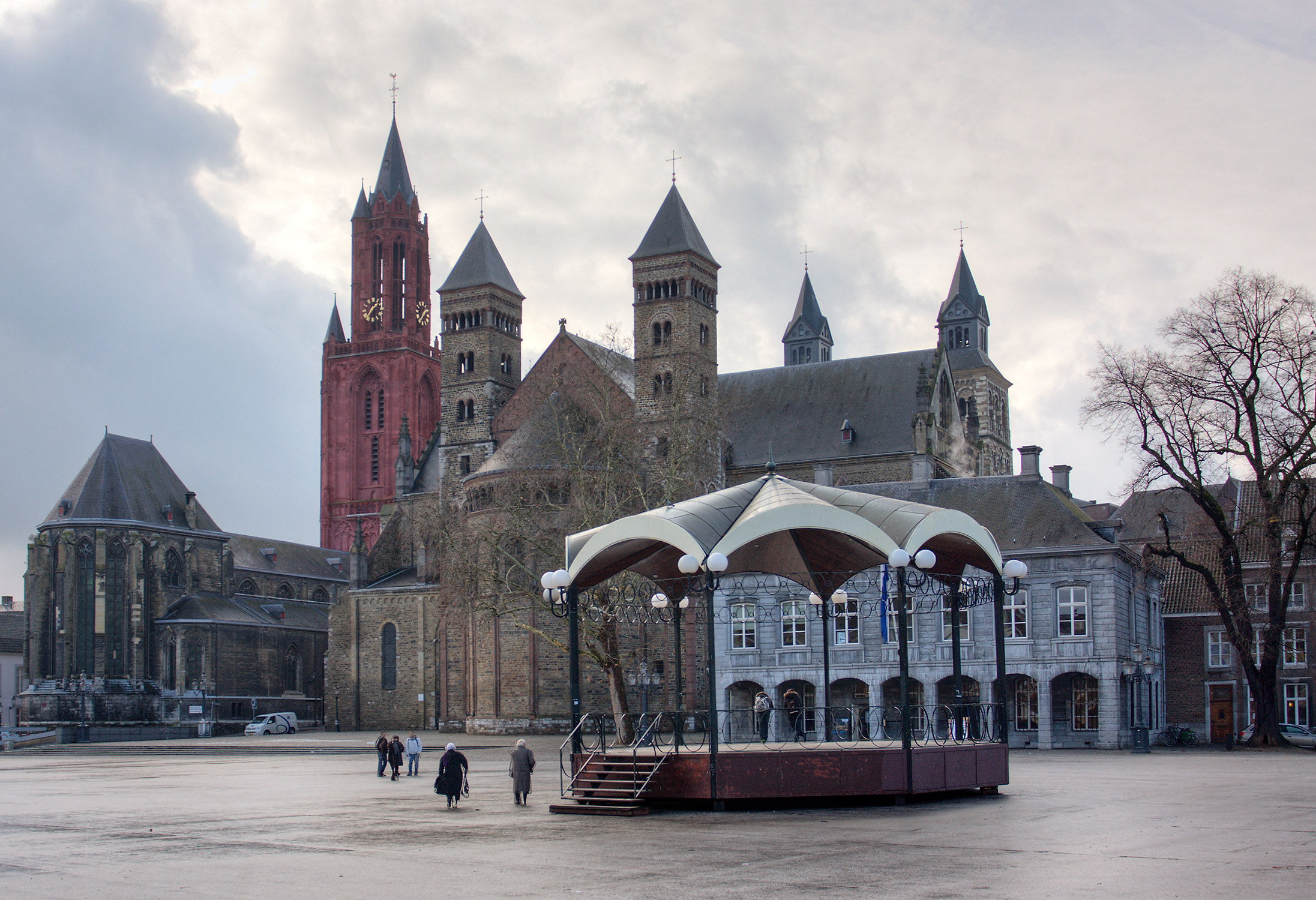 Vrijthof / Maastricht, Holland